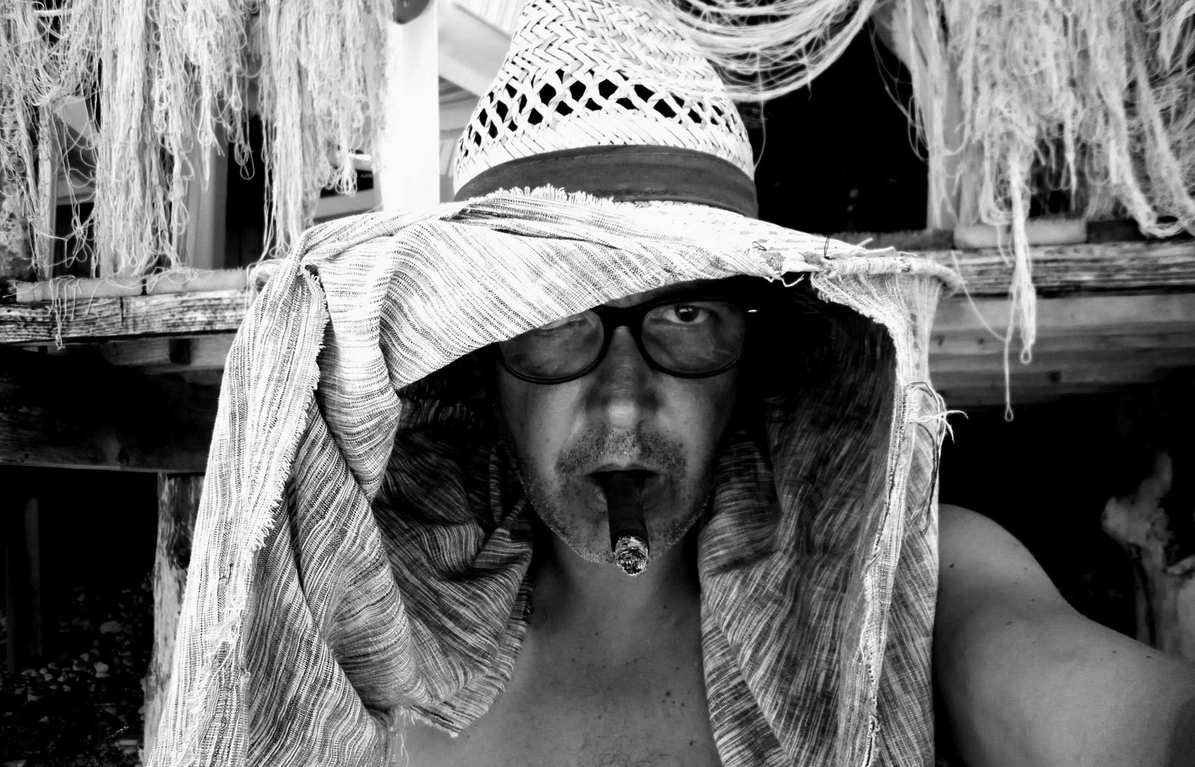 Stefan Bohnenberger, Ithaca 2012